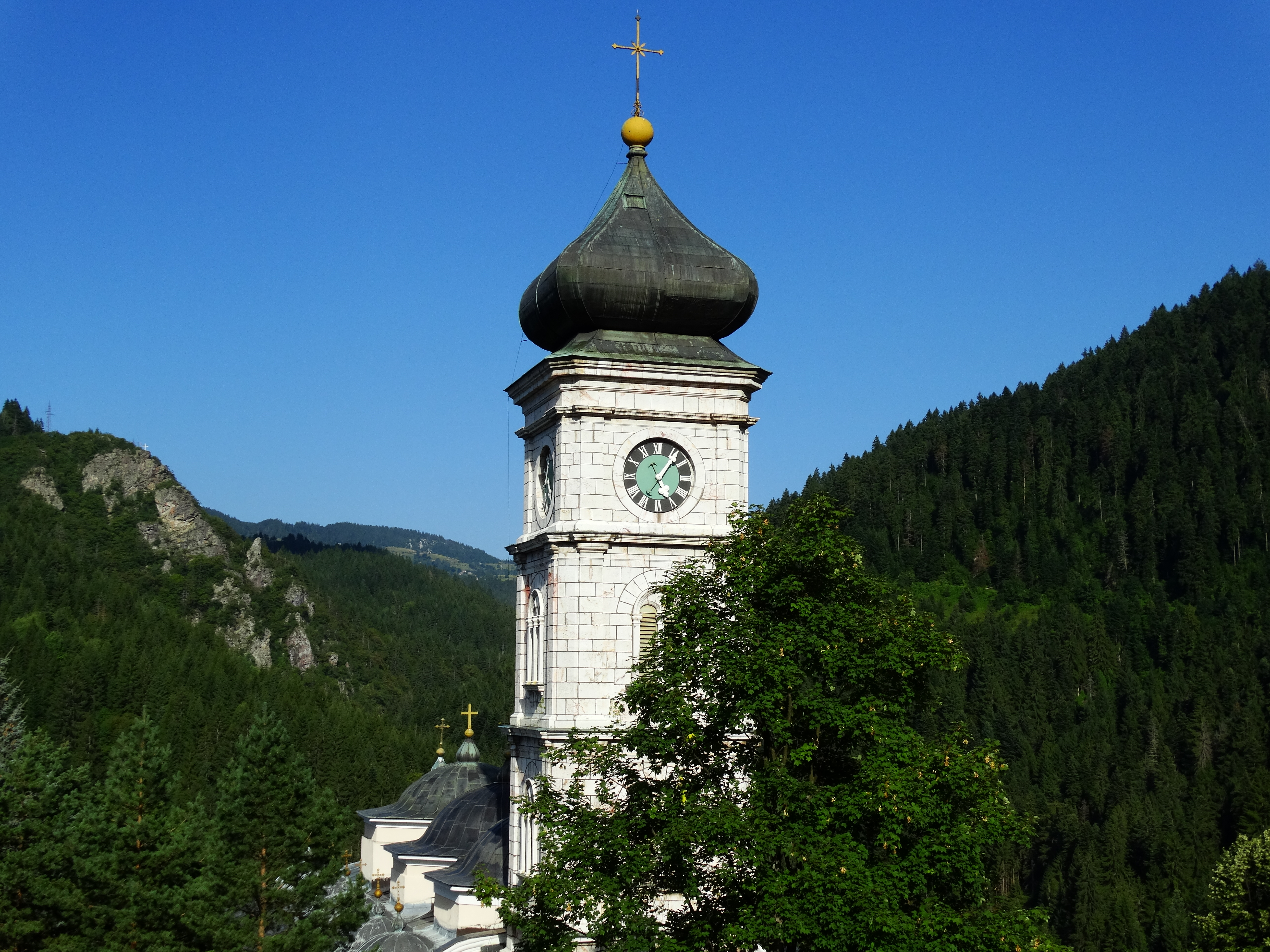 Crkva Uspenija Presvete Bogorodice u Čajniču